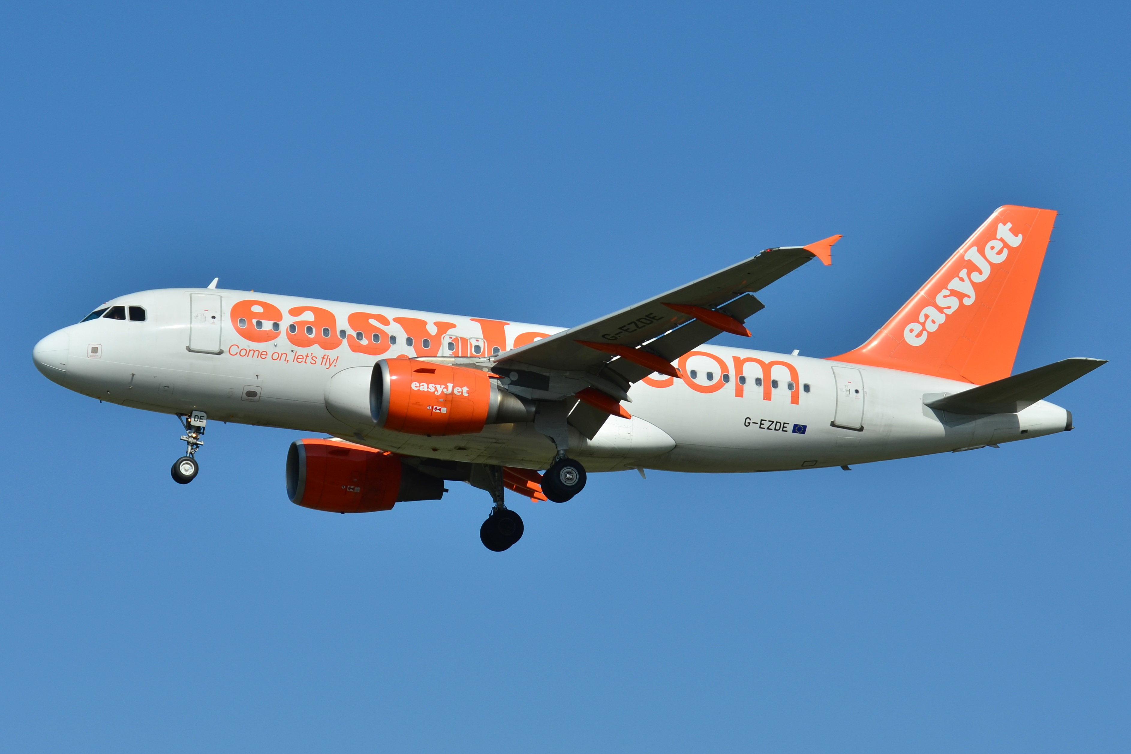 Photo prise à l'aéroport de Toulouse-Blagnac (LFBO) en France. Picture take at Toulouse-Blagnac Airport (LFBO) in France.